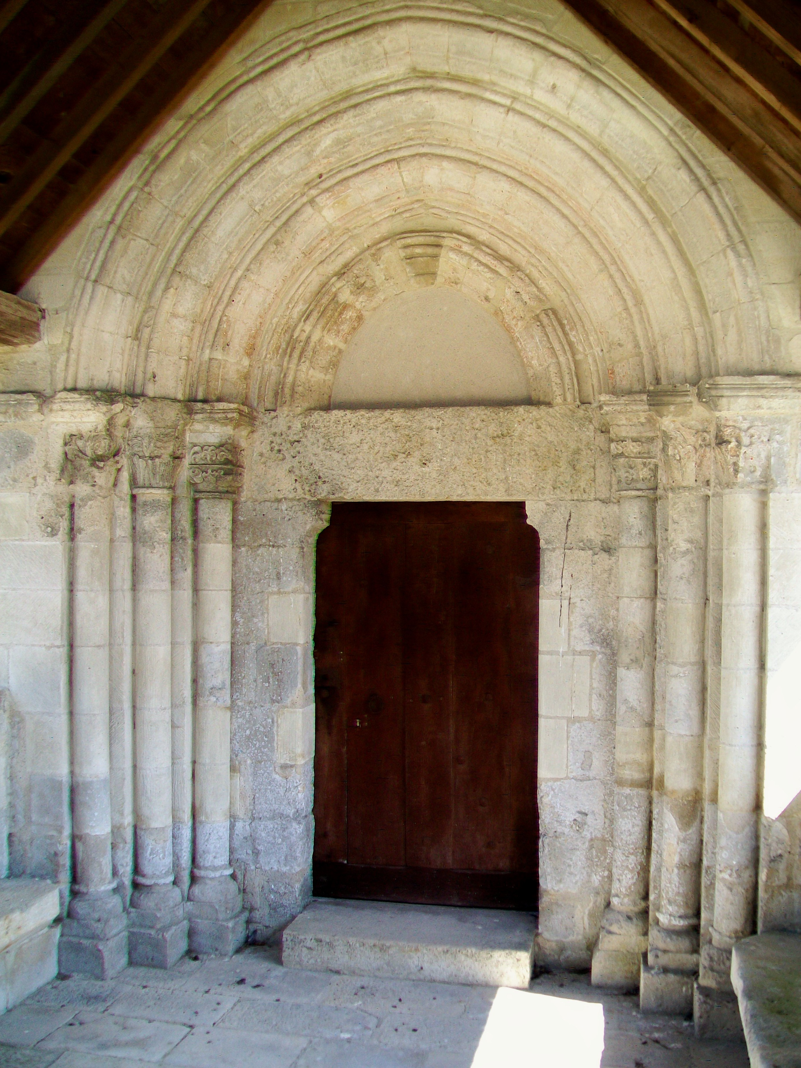 Le portail.